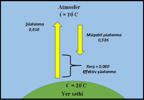 Yer şüalanmasının sxemi, kal/dəqiqə ilə